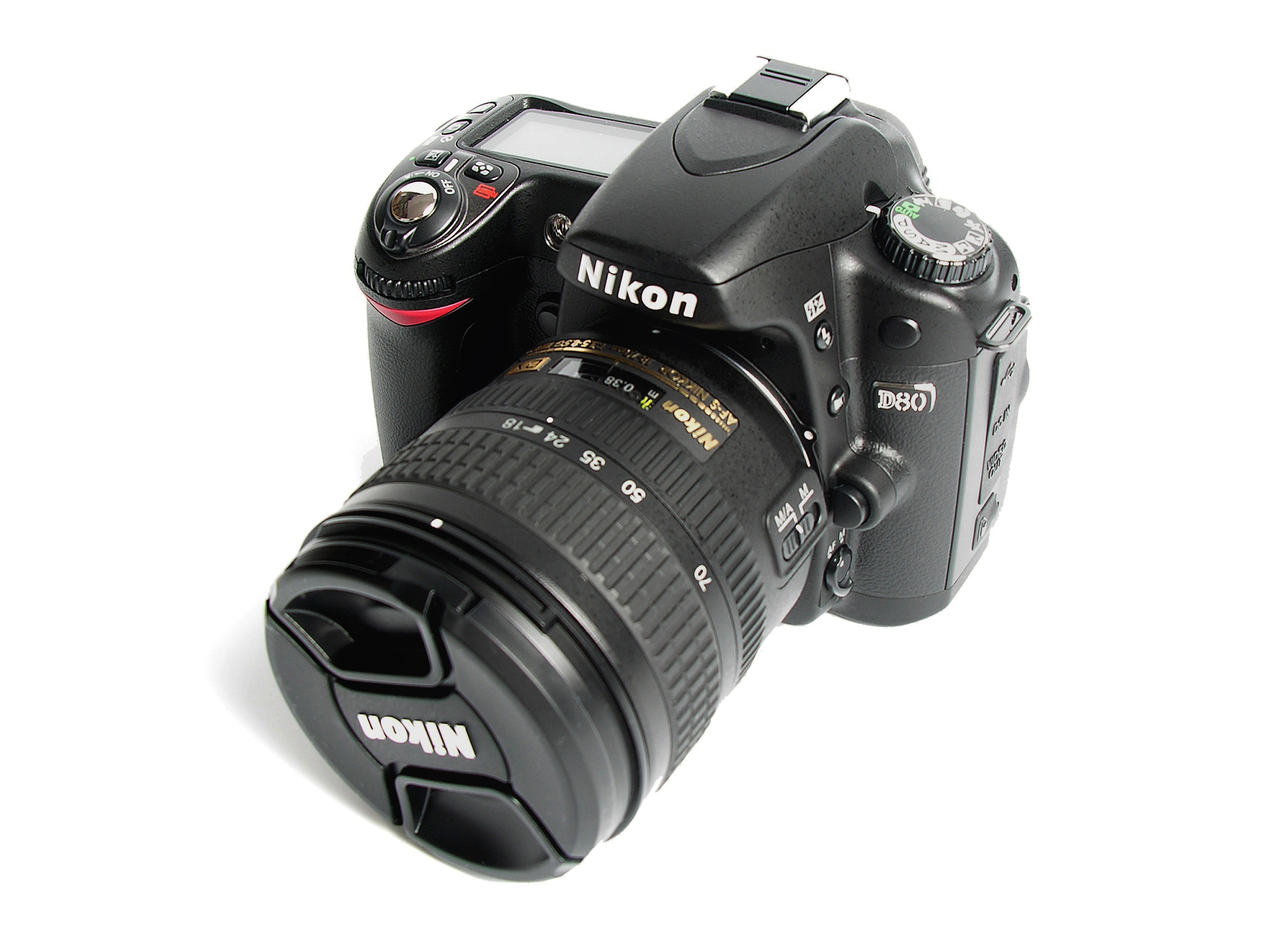 Nikon D80 Digital SLR with Nikkor AF-S DX 18-70mm lens